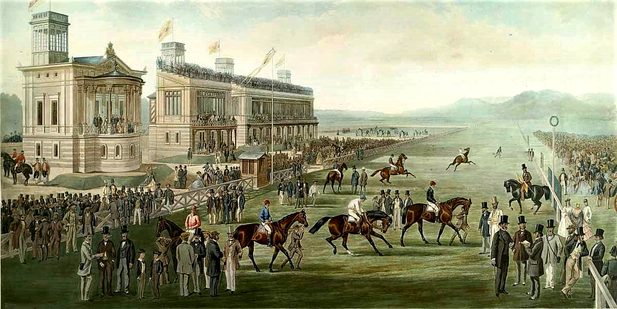 Pferderennbahn Iffezheim